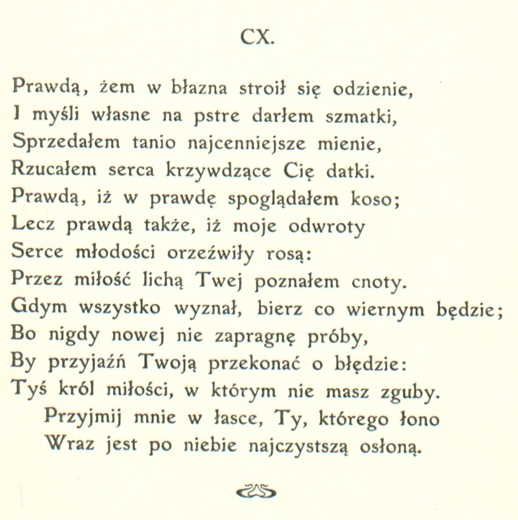 Sonety Shakespeare'a I-CXXXIV i CXXXVII-CLIV tłumaczenie Maria Sułkowska (MUS) sonet 110 (strona 124)